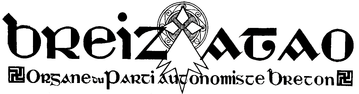 Logo utilisé par la revue Breiz Atao à partir d'avril 1928. Le hévoud, déjà utilisé par le parti depuis février 1925, est pour la première fois intégré au titre (mais est abandonné dès 1929 dans un contexte de monté du nazisme en Allemagne).